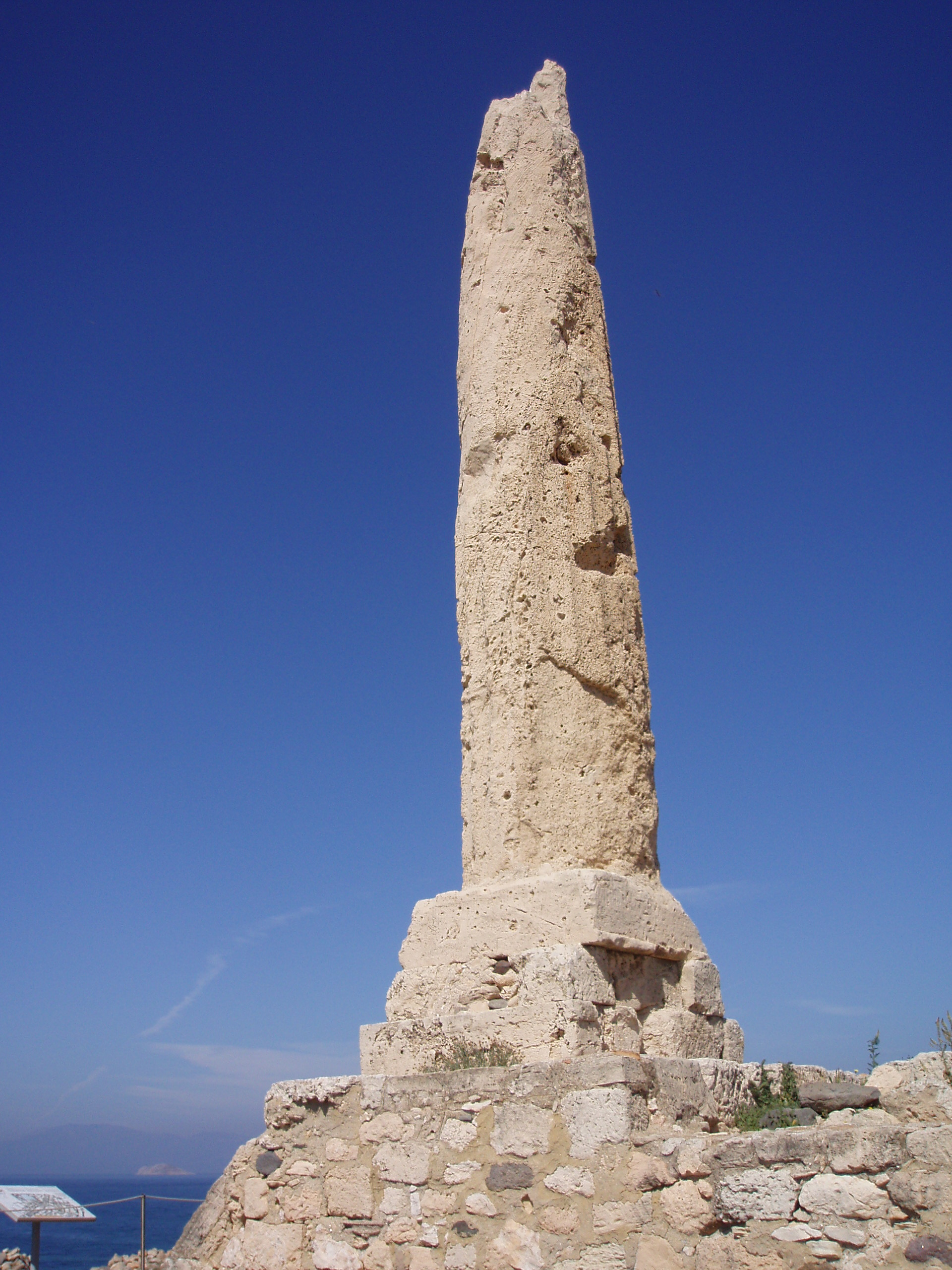 Säule des Apollontempels auf Ägina